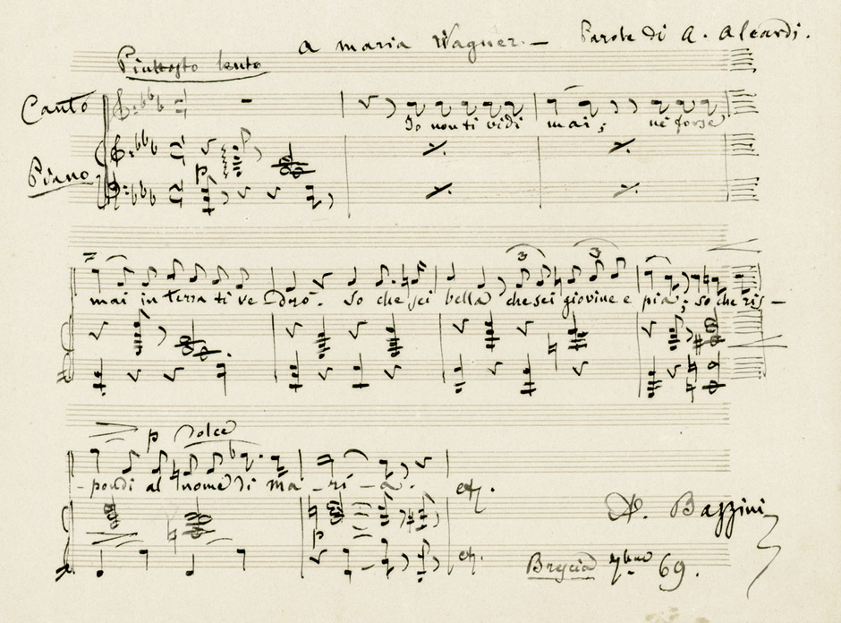 Eigenhändiges musikalisches Albumblatt 15,5 x 21 cm. Brescia, September 1869